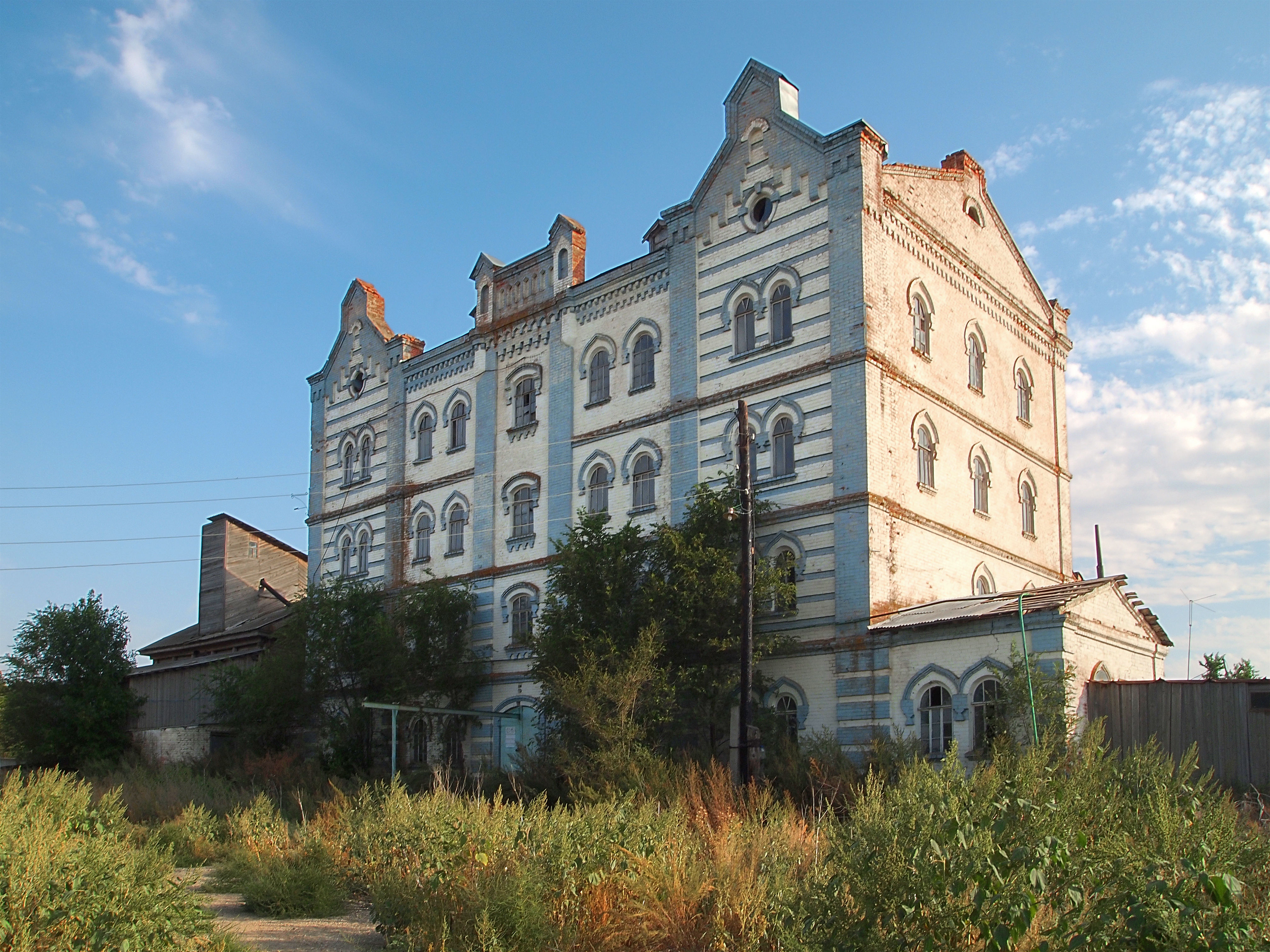 Мельница Червова: Мельничный городок, Новоузенск, Новоузенский район, Саратовская область